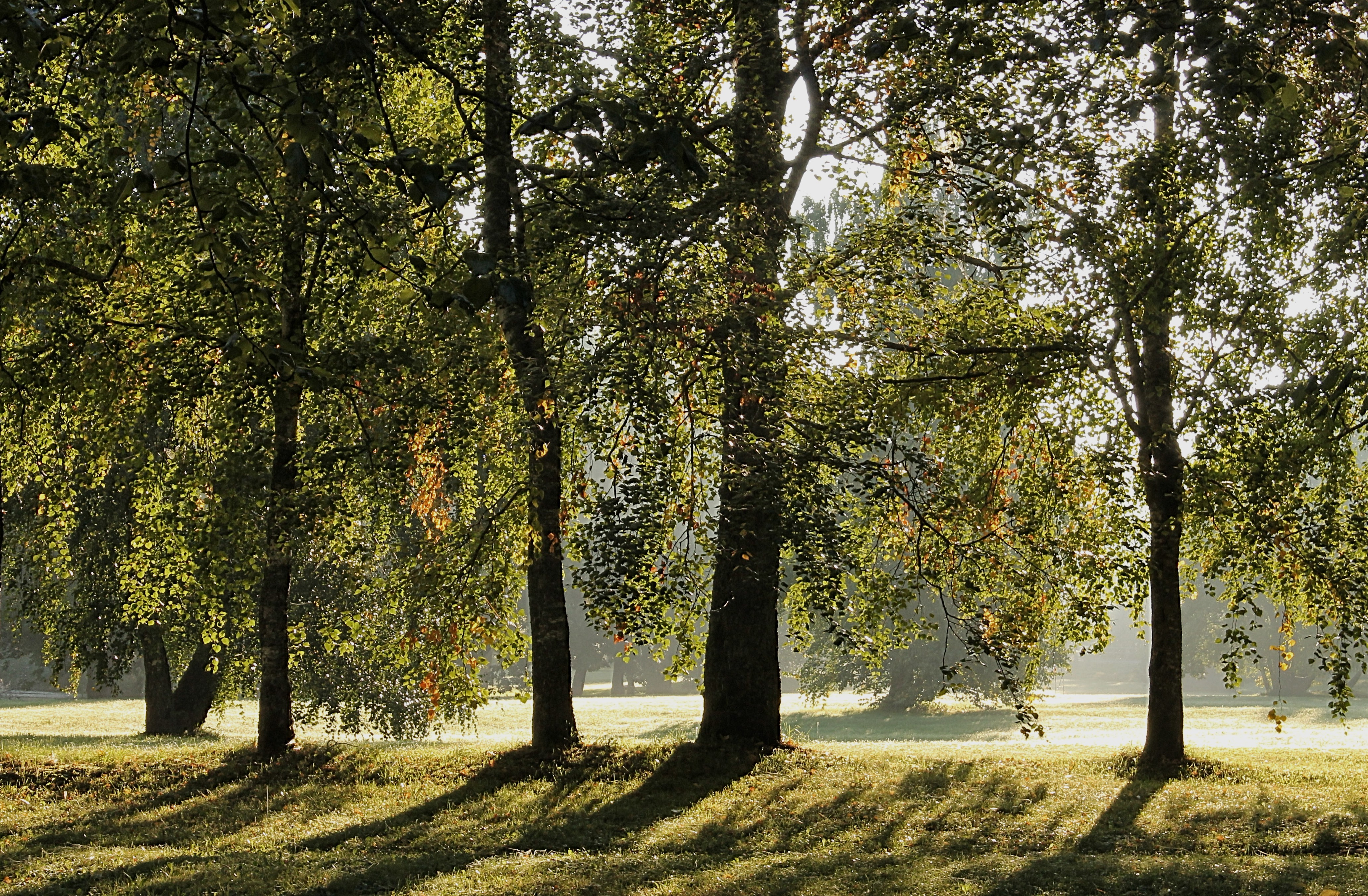 Mõnus septembrihommik, Uuemõisa park, Ridala vald, Läänemaa